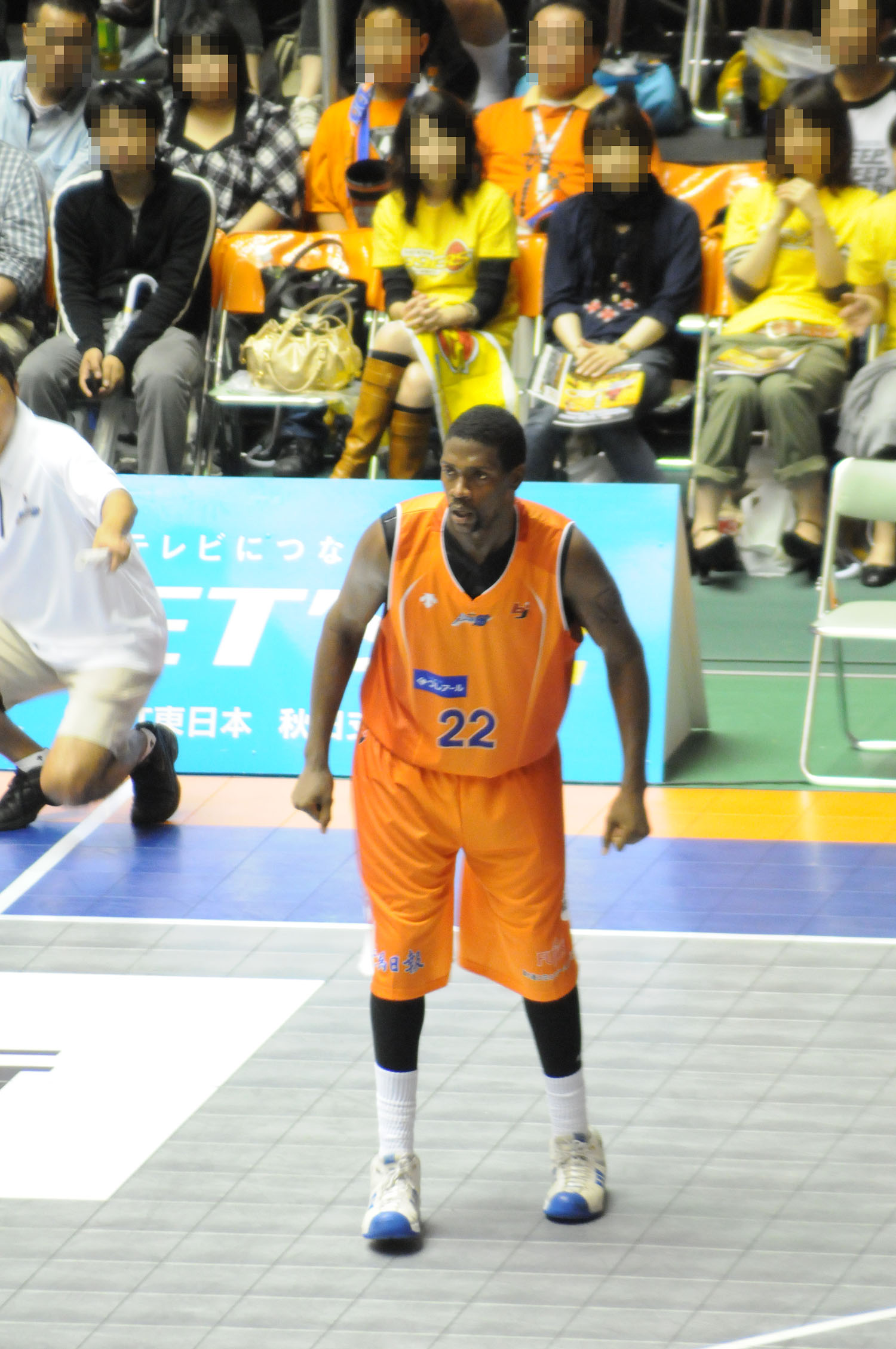 新潟アルビレックスBB、アントニオ・バークス選手。秋田県立体育館で。